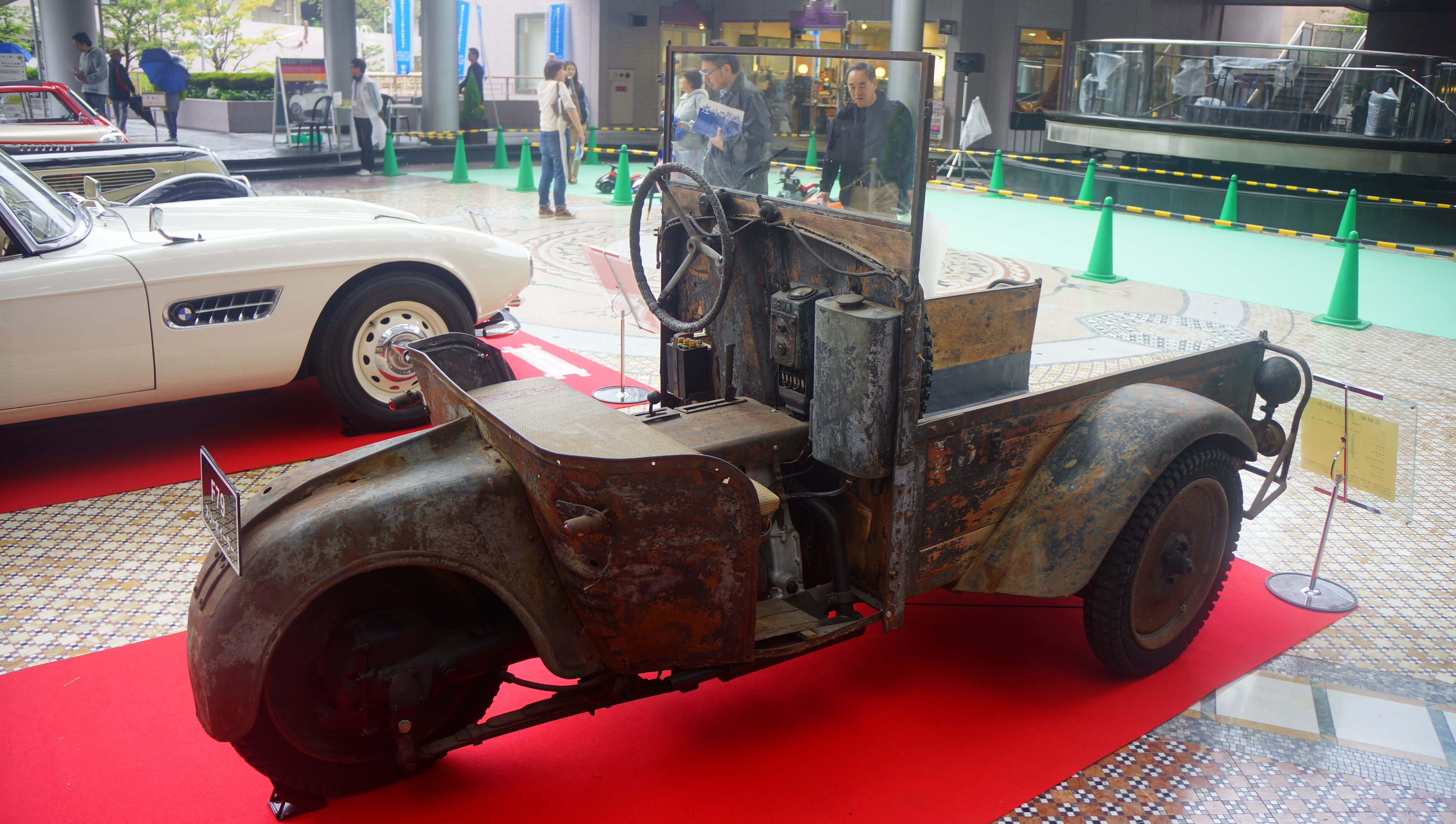 BMW F79 スリーホイーラー。 13年10月20日 堺市ポルタスセンタービル内ポルタス広場にて。